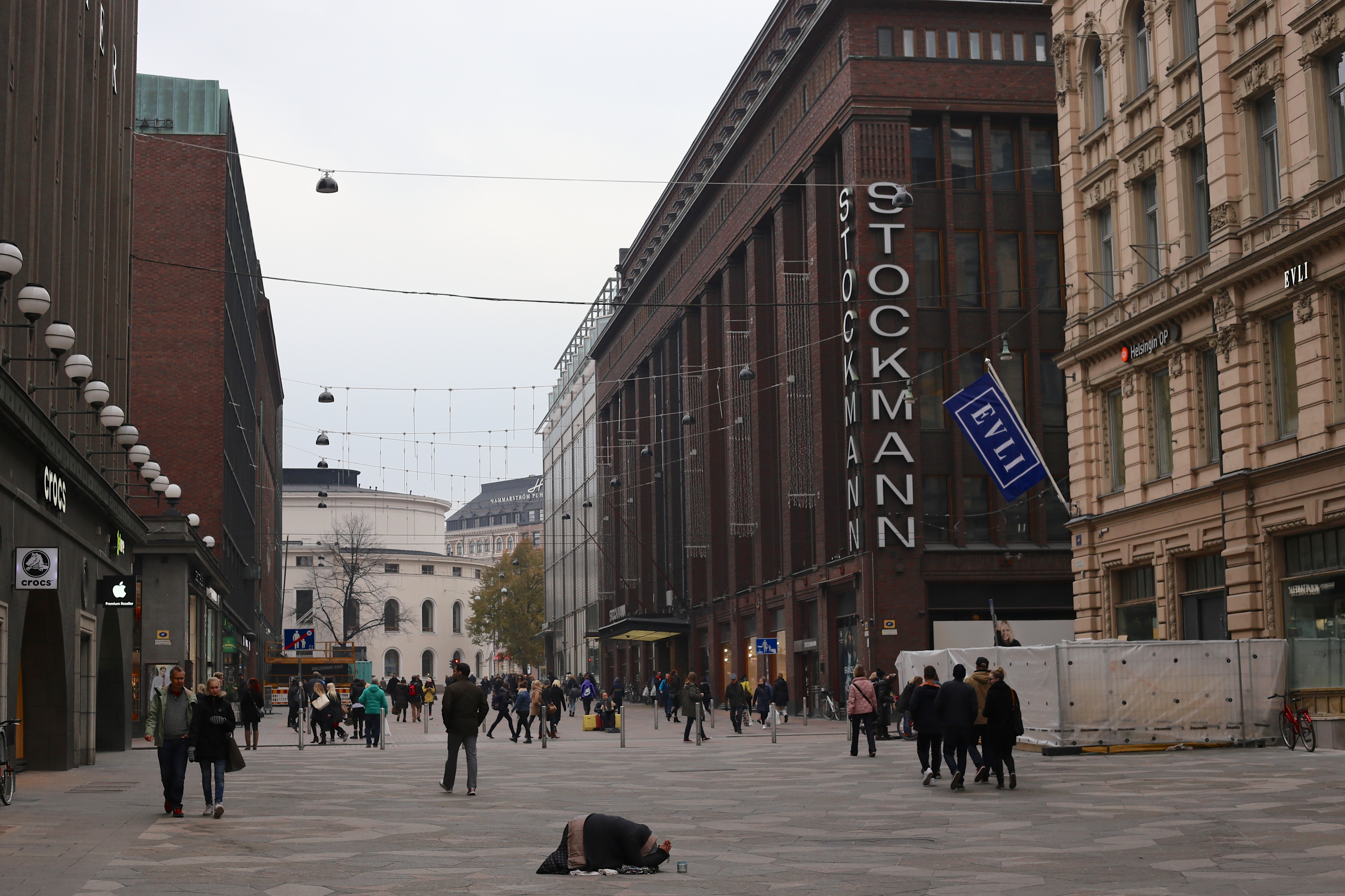 Keskuskatu